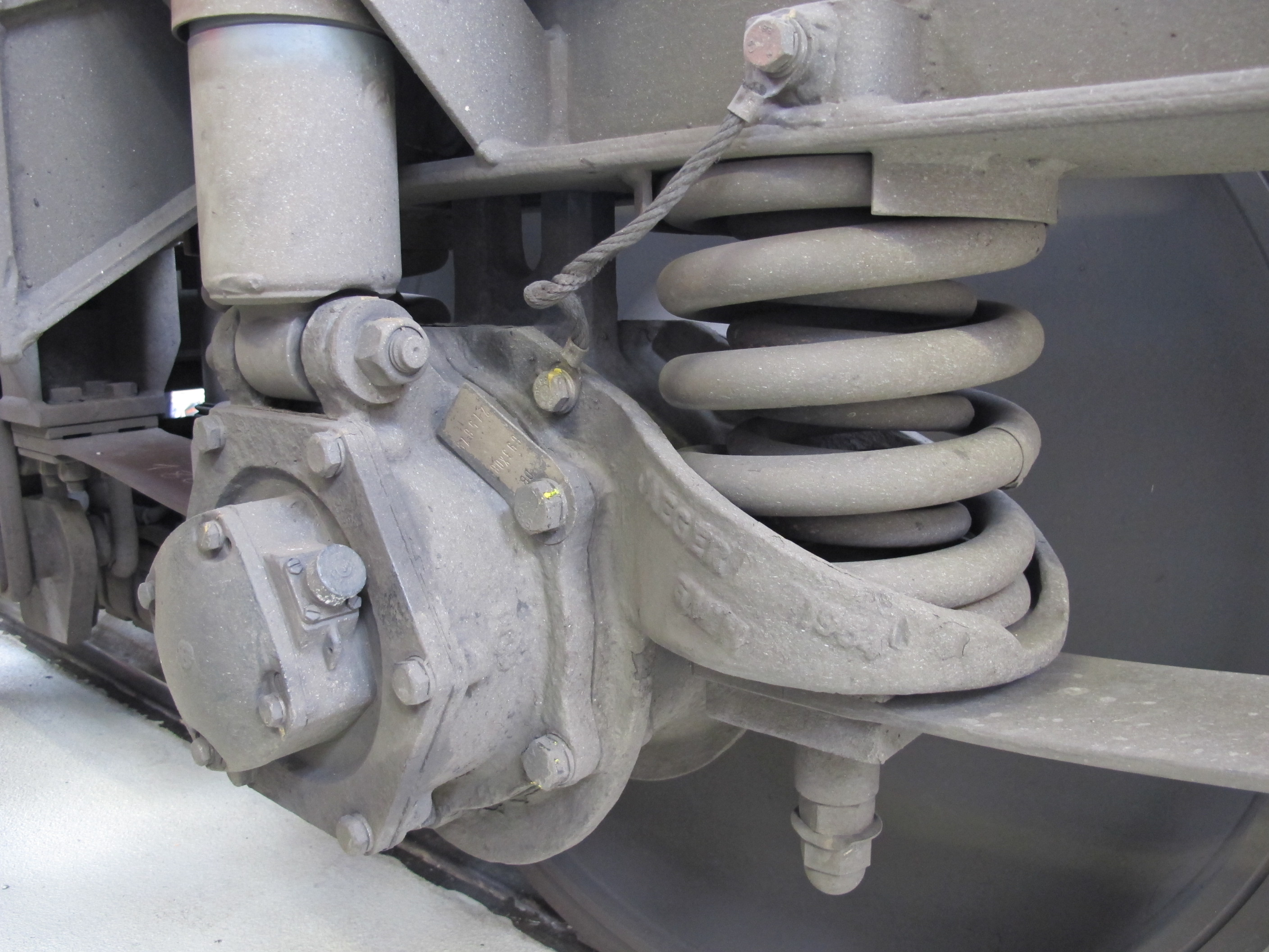 Primärfederung und Schwingungsdämpfer Drehgestell